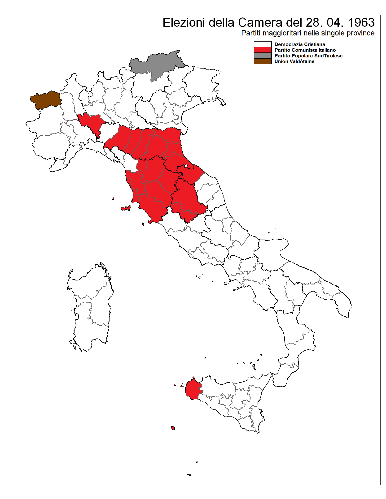 Partiti maggioritari nelle province, voto 1963